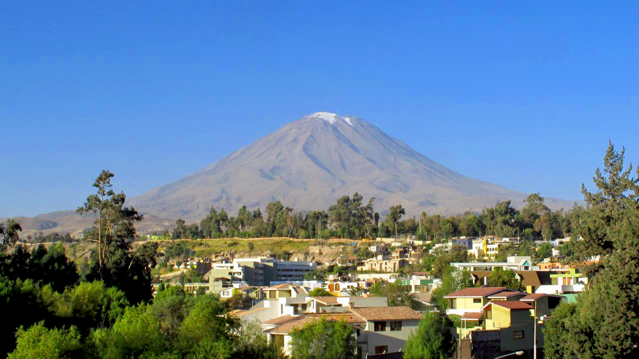 El volcán Misti sobre Arequipa